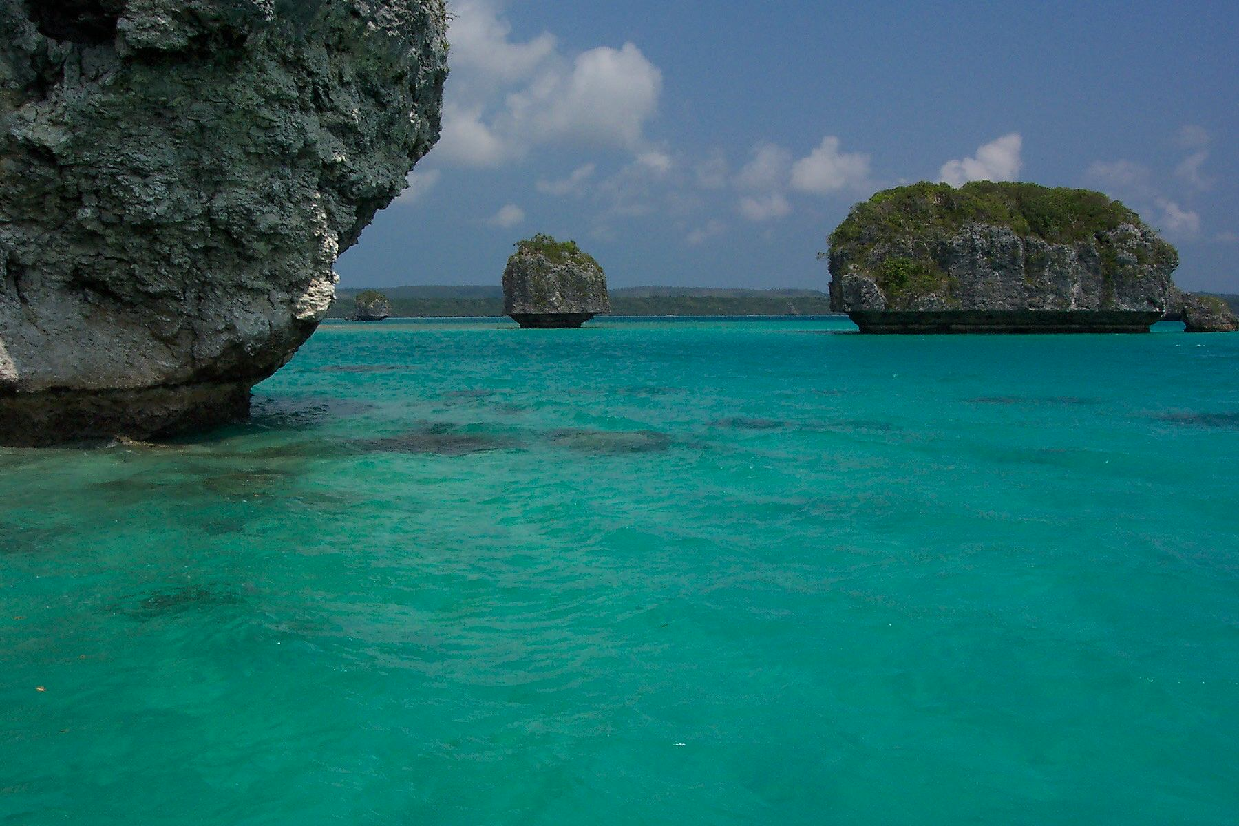 Nouvelle-Calédonie - Nouméa - Ile des Pins - la baie d'Upi photo personnelle libre de droits - personal picture free license